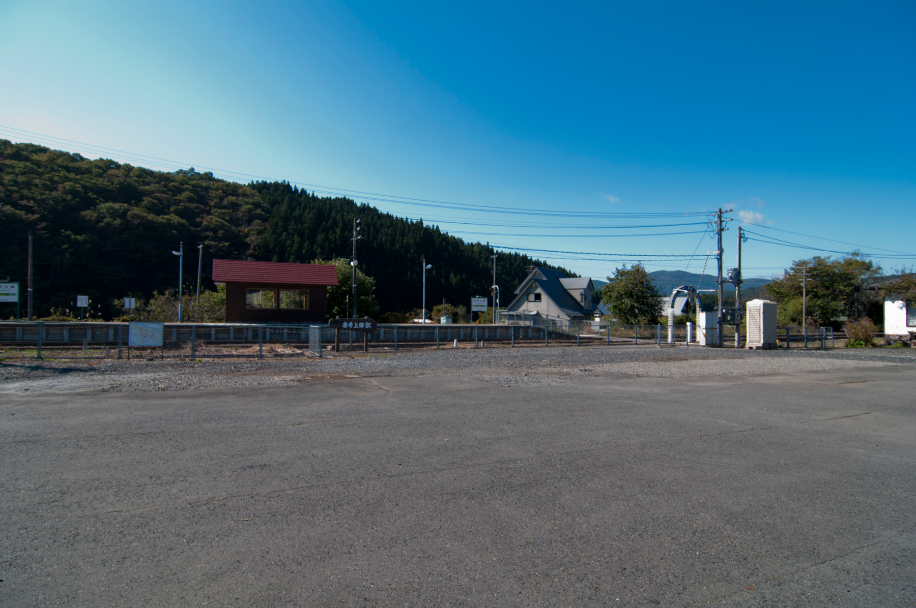 東日本旅客鉄道釜石線岩手上郷駅